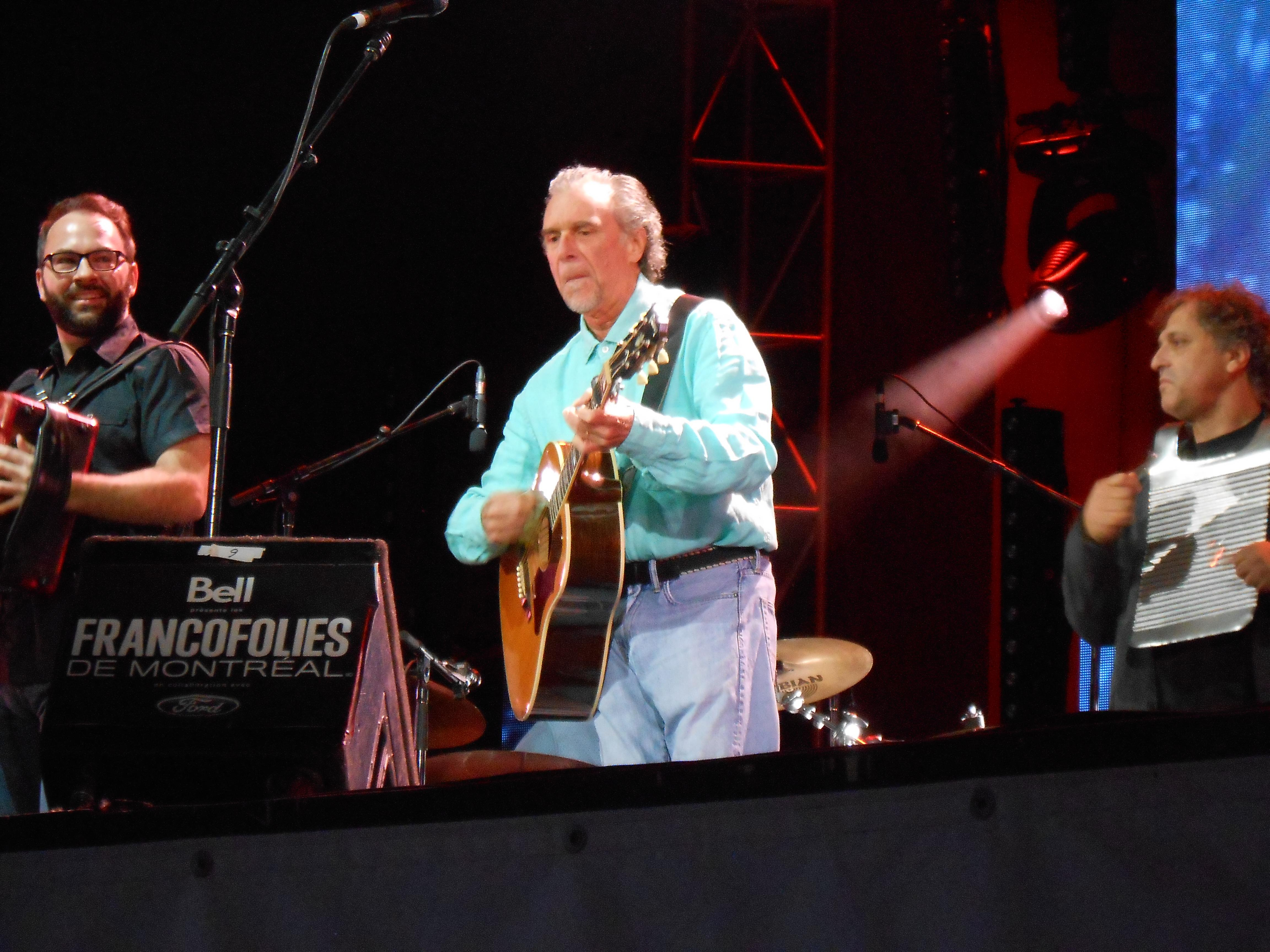 Zachary Richard a offert une performance aux FrancoFolies de Montréal, le 19 juin 2013, à la place des Festivals.